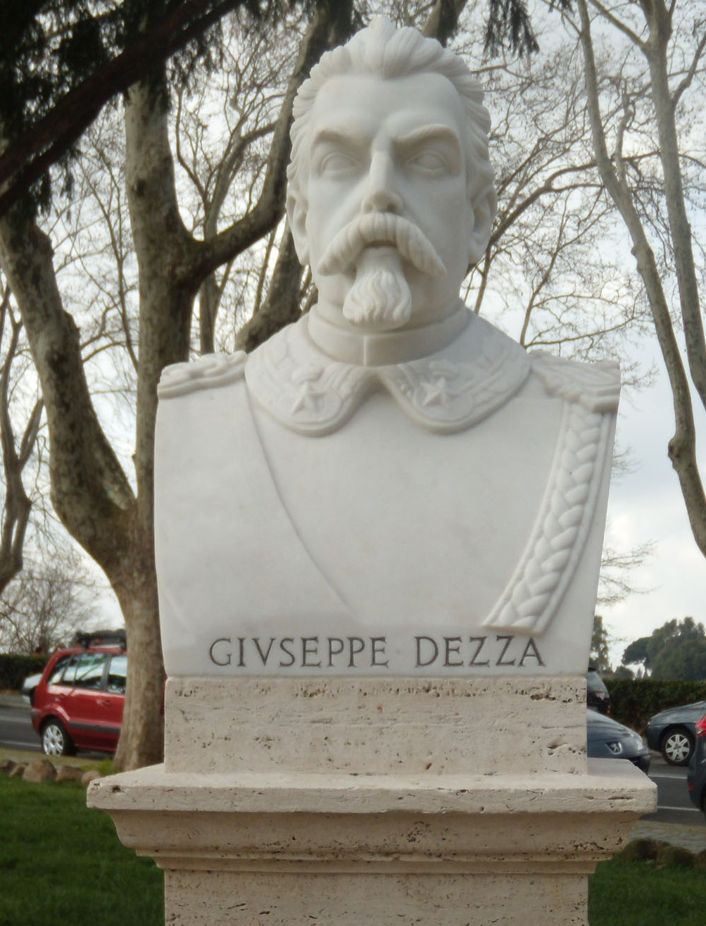 Busto restaurato di Giuseppe Dezza